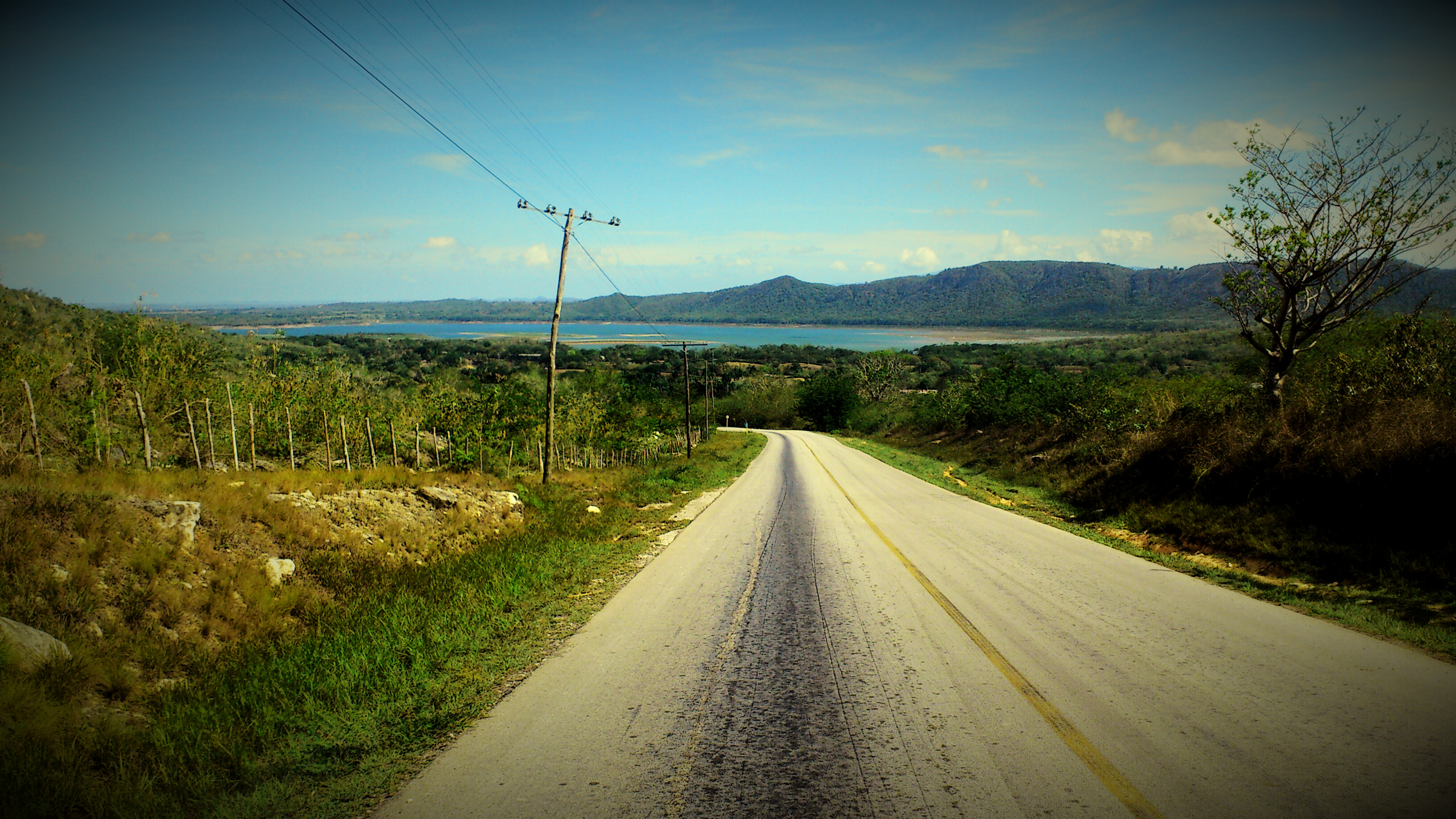 Costa Rica, Cuba